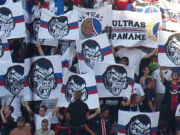 Grinta Paris, association de loi 1901 occupant la tribune Auteuil Rouge de 2007 à 2010.